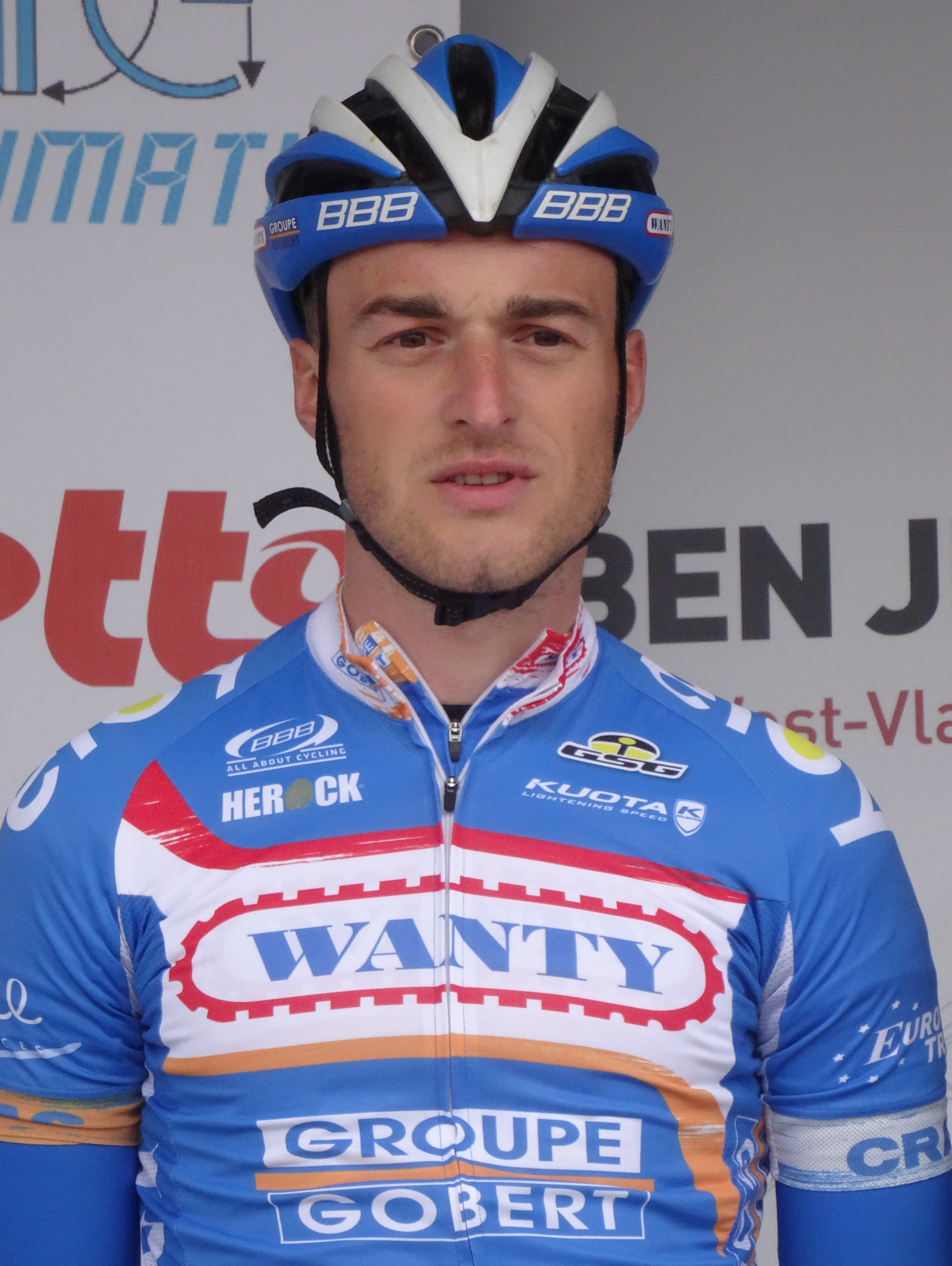 Reportage photographique réalisé le mercredi 24 septembre à l'occasion du départ et du début de la course du Circuit du Houtland 2014 à Lichtervelde, Belgique.